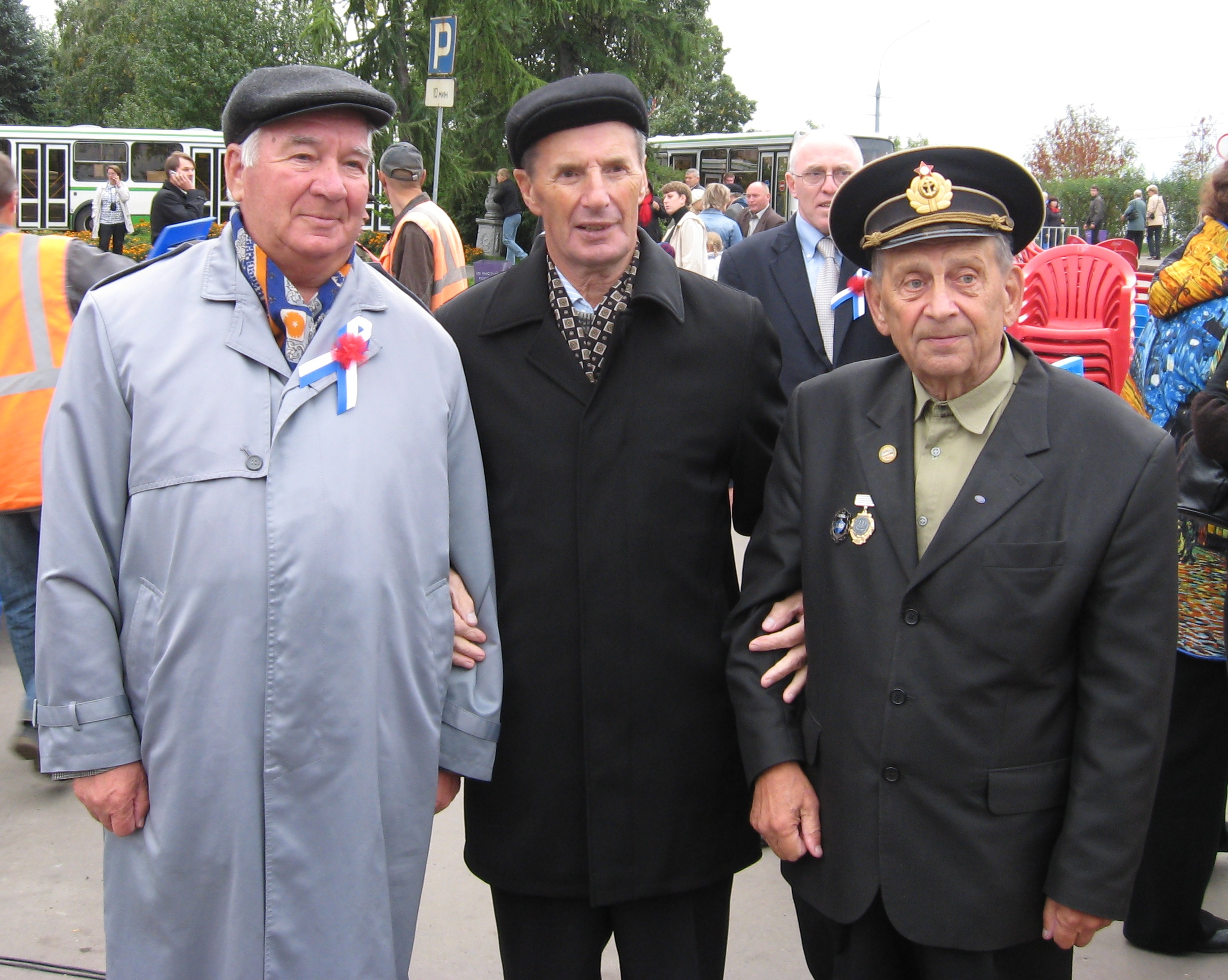 Экс-губернатор Архангельской области Павел Николаевич Балакшин (в центре) на церемонии открытия памятника-стеллы "Город воинской славы"